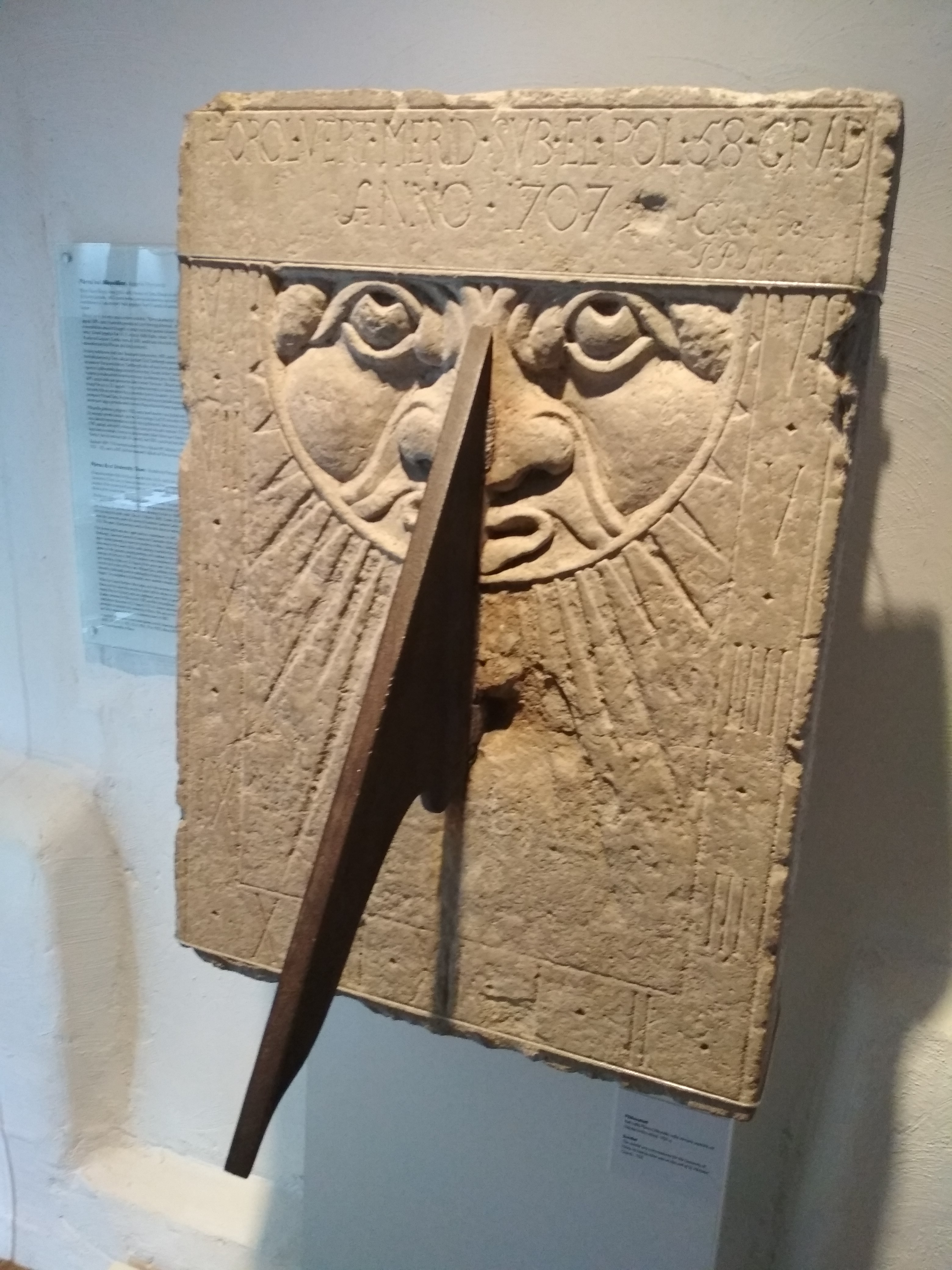 1707. aastast pärinev Pärnu Ülikoolile tellitud päikesekell. Viimati asus Nikolai kiriku seinal. Hetkel Pärnu muuseumis.